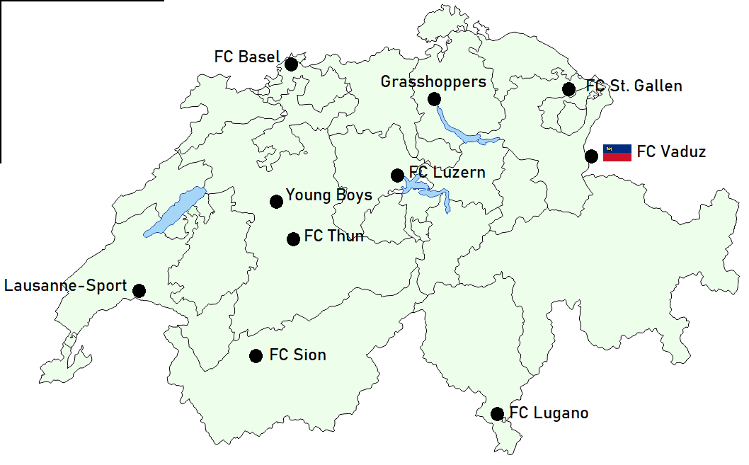 Geografische locaties van de clubs uit de Zwitserse Super League 2016/17.